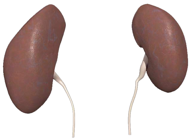 Kidney